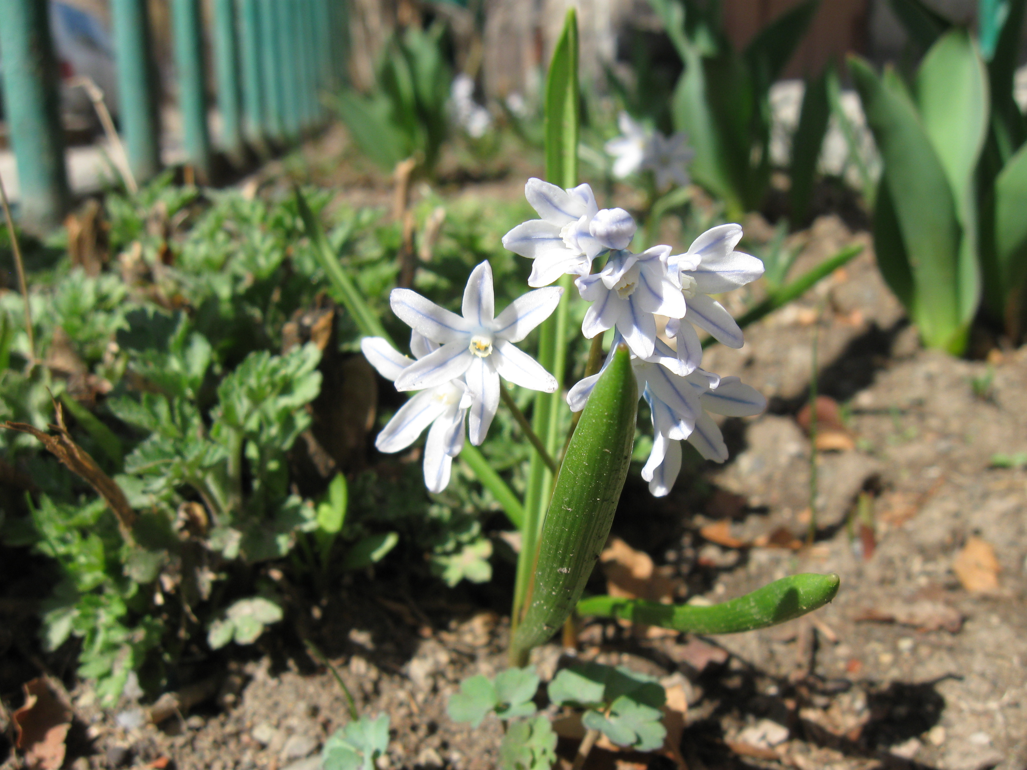 Puschkinia is a genus of three known species of bulbous perennials in the family Asparagaceae, subfamily Scilloideae. It is native to the Caucasus and the Middle East.